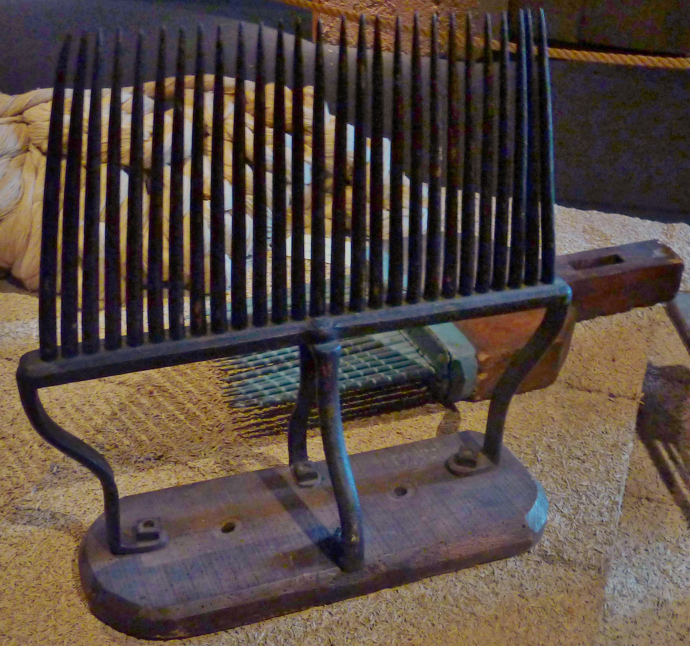 Peigne à chanvre (exposition port-musée de Douarnenez en 2013)